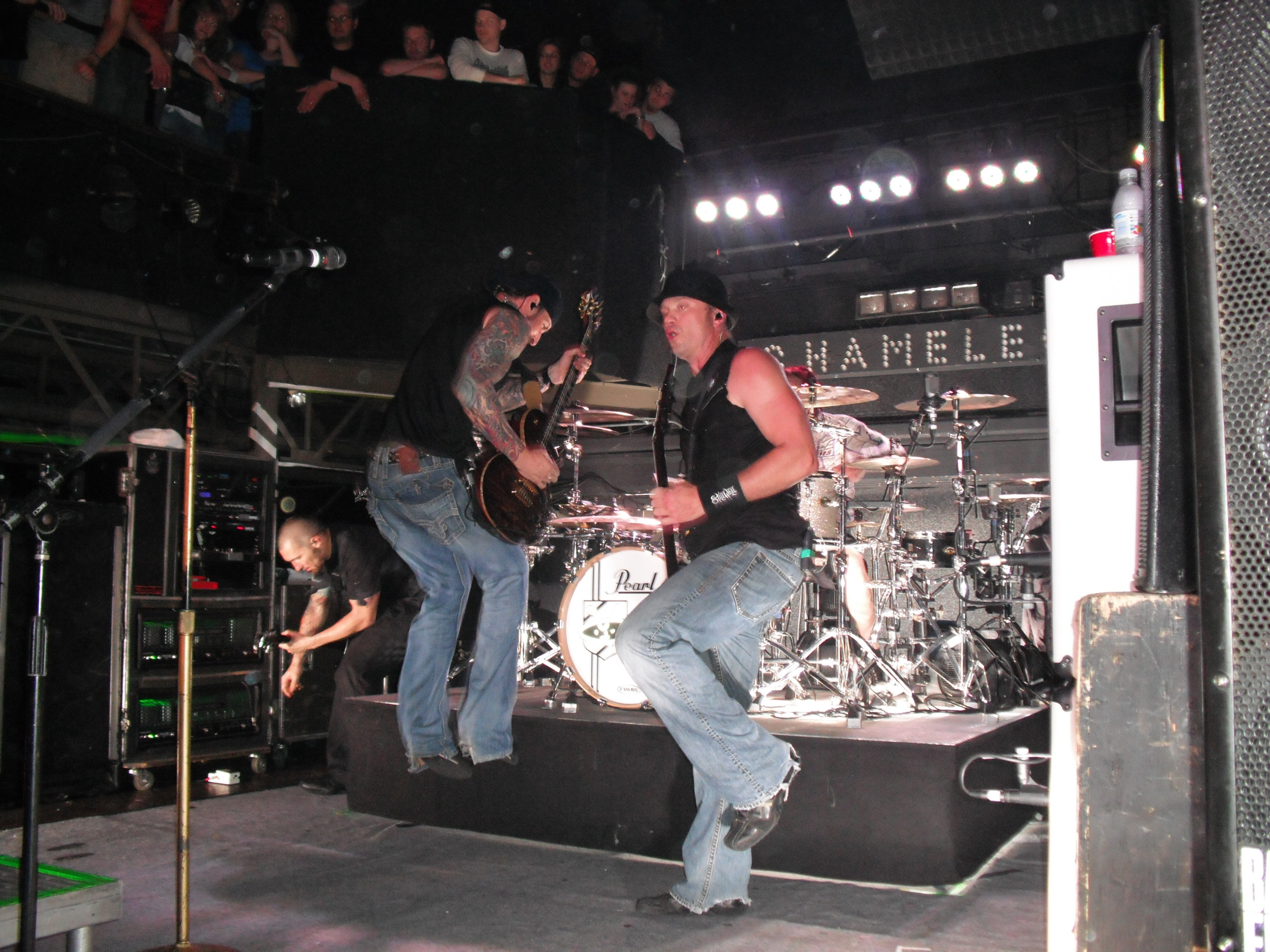 sevendust